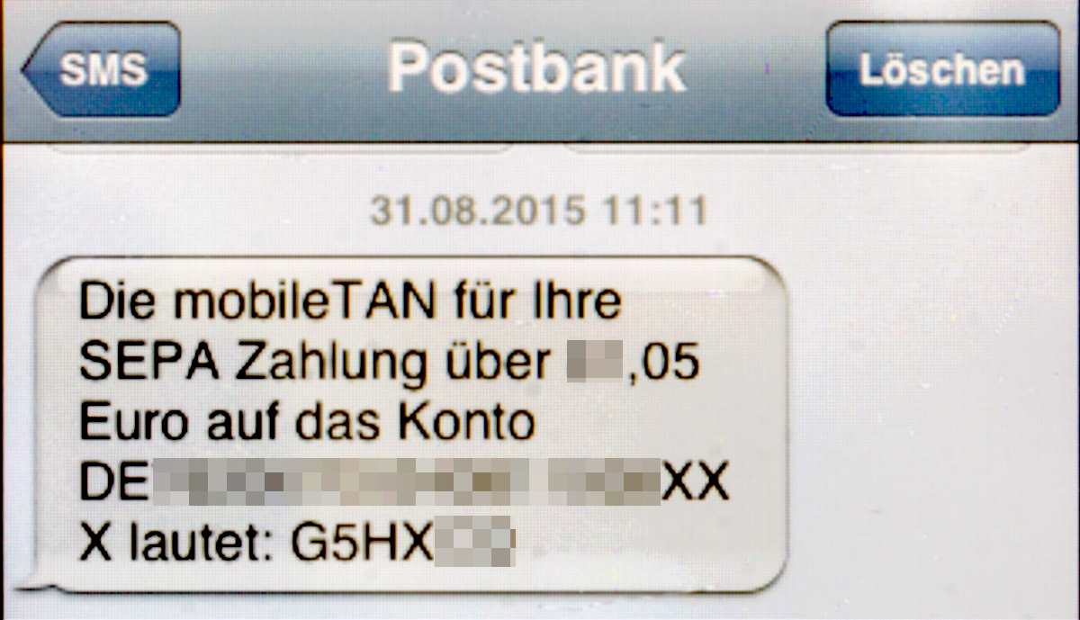 Mobile TAN (mTAN) für eine Überweisung von einem Postbank-Konto